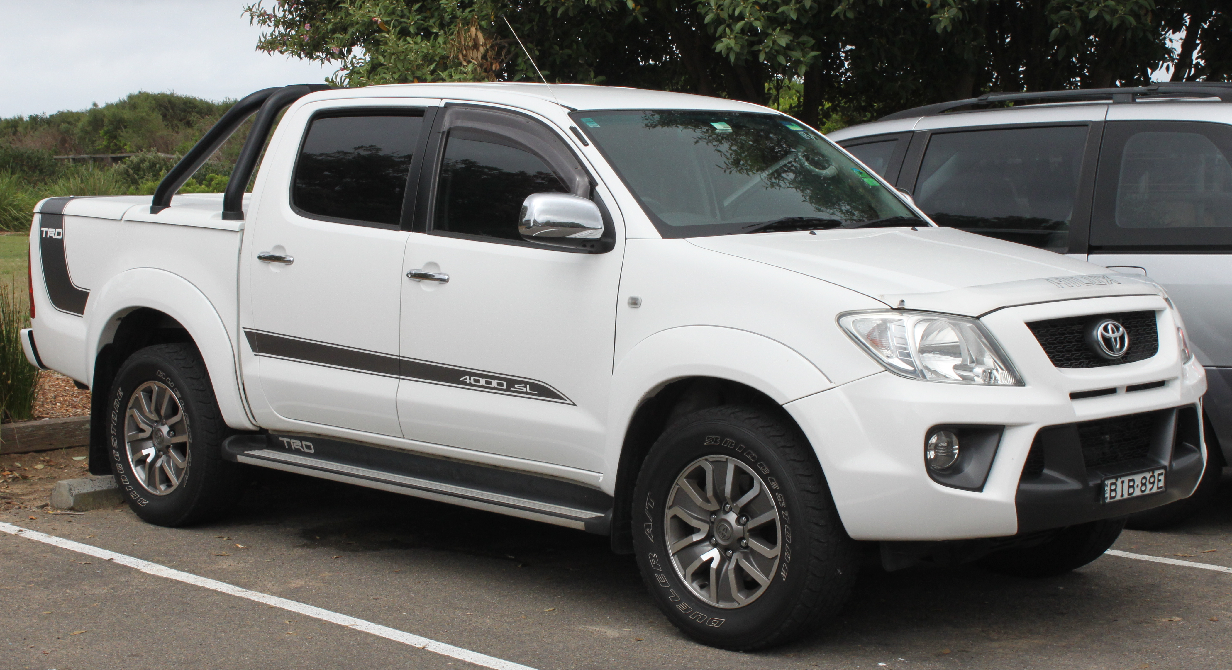 Toyota Hilux GGN25R TRD 4000SL